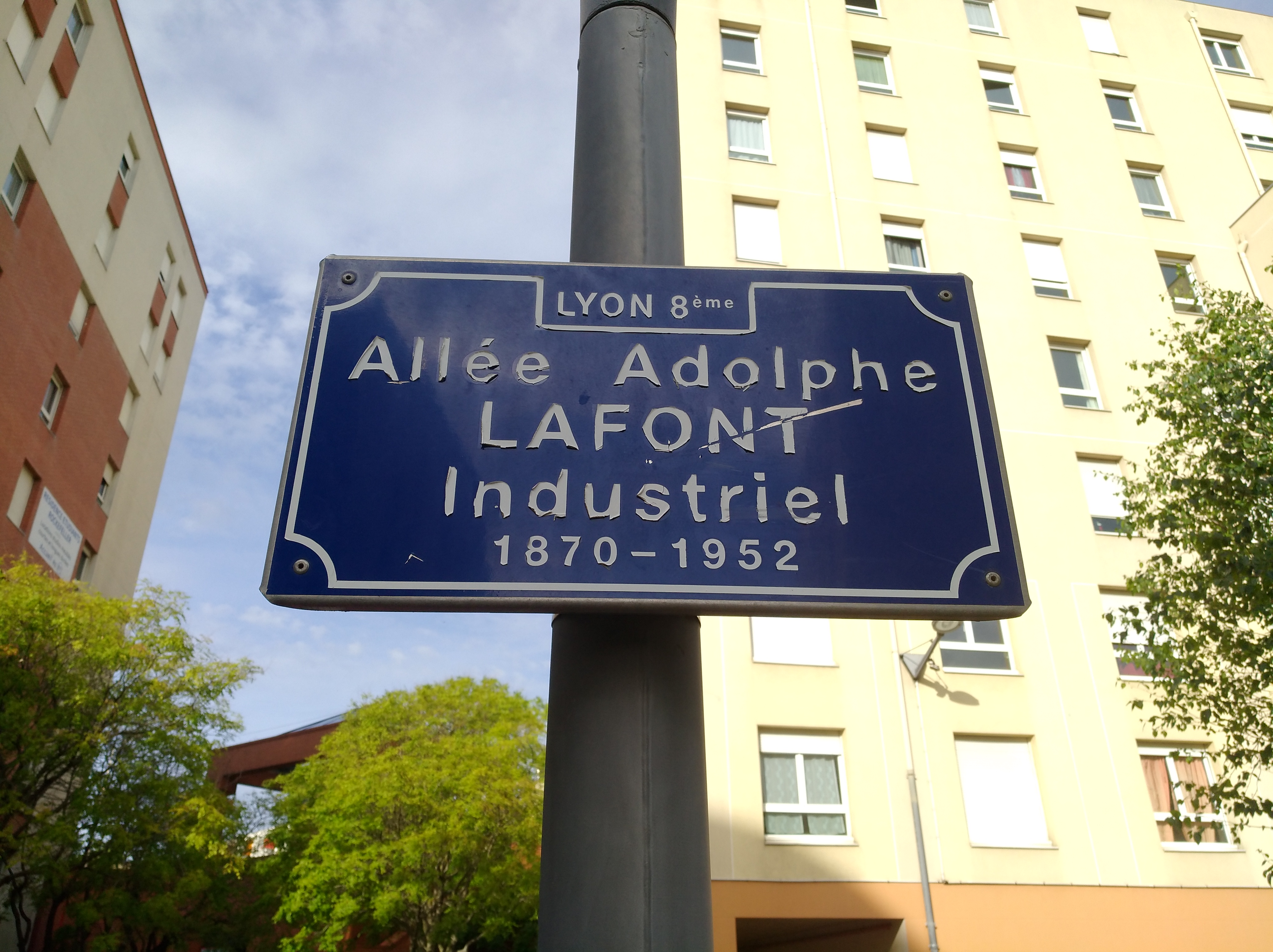 Plaque de l'allée Adolphe Lafont, dans le 8e arrondissement de Lyon.